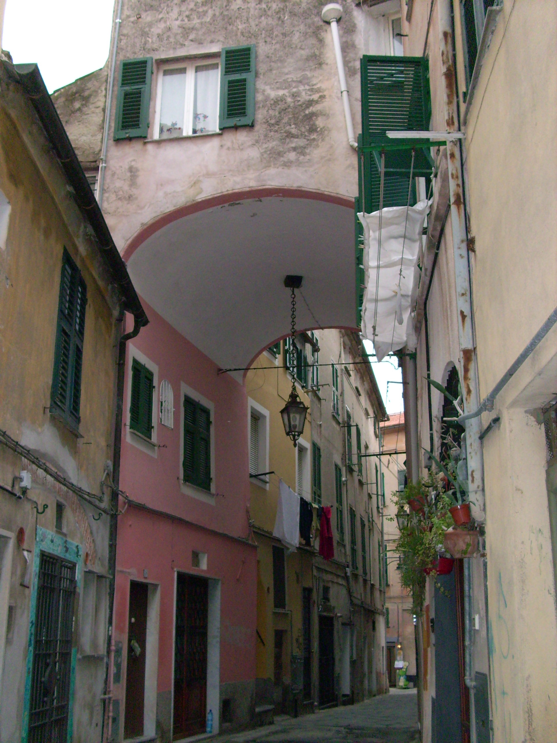 Albissola Marina, Liguria, Italy